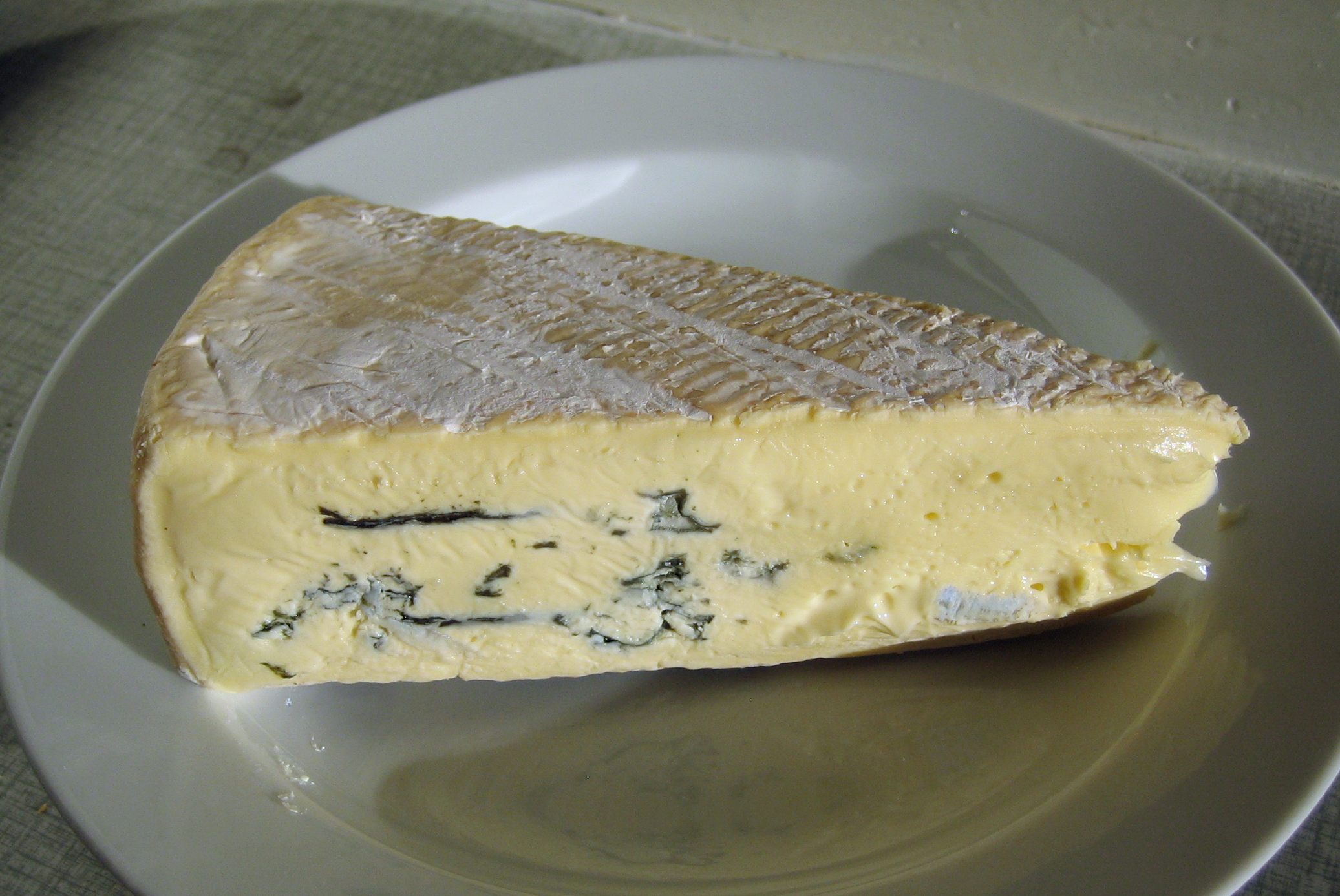 Cambozola cheese